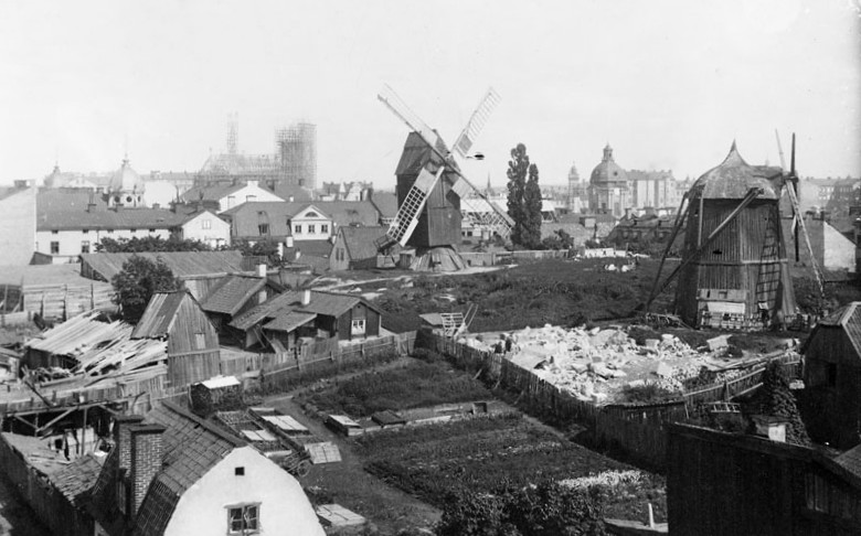 Barnhuskvarnarna i Tegnérlunden som revs 1890. I bakgrunden syns bygget av Johannes kyrka. Invigd i maj 1890.